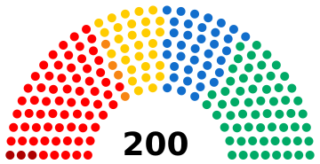 Distribución de los Escaños en la Cámara Alta del Reino de Talossa